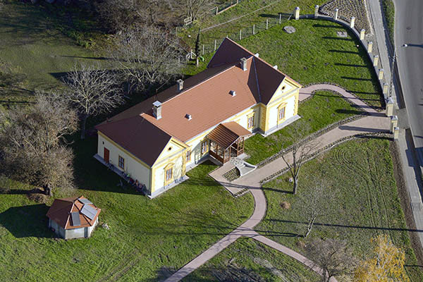 Cece, Csók-Szluha-Kiss kúria